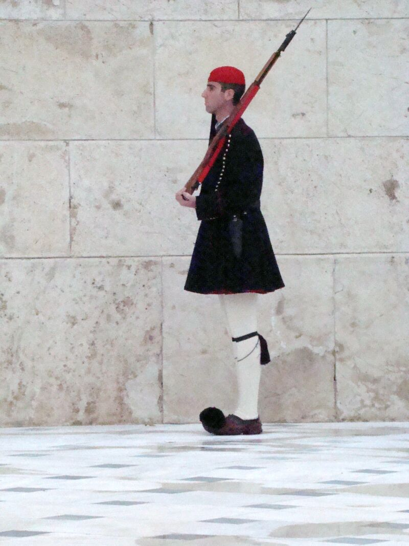 Typická uniforma Evzones